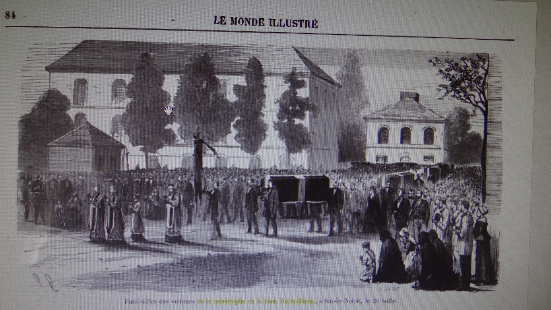 Waziers Funérailles suite à catastrophe